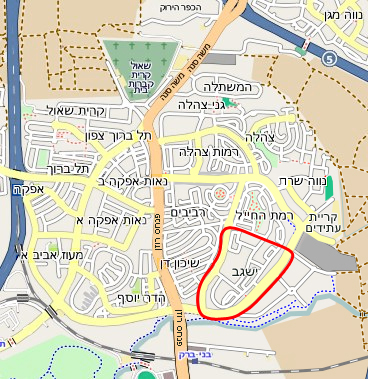 Yisgav, Tel Aviv